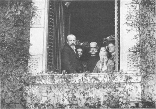 Erzherzog Rainer (Mitte) und seine Gattin Marie (2. v. r.), Erzherzog Karl Stephan (l.) und dessen Töchter Erzherzoginnen Eleonora (2. v. l.) und Renata (r.) 1908 in der Villa Quisiana in Abbazia.